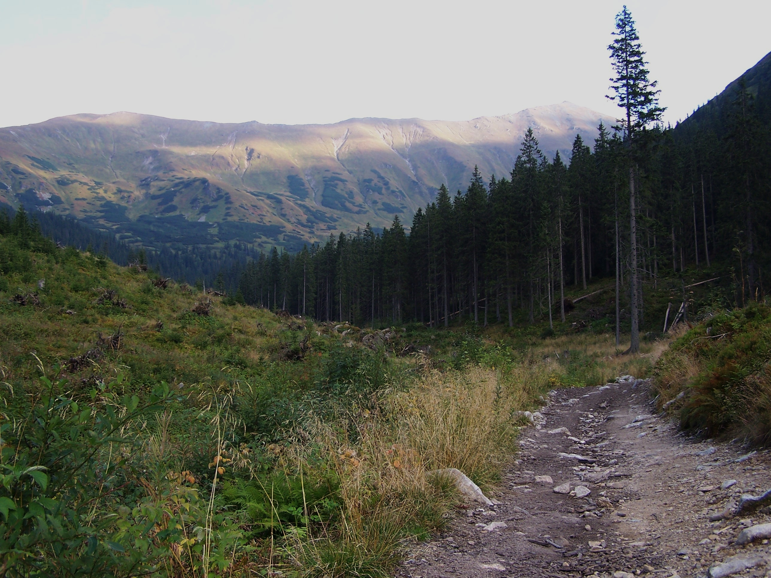 Dolina Jarząbcza